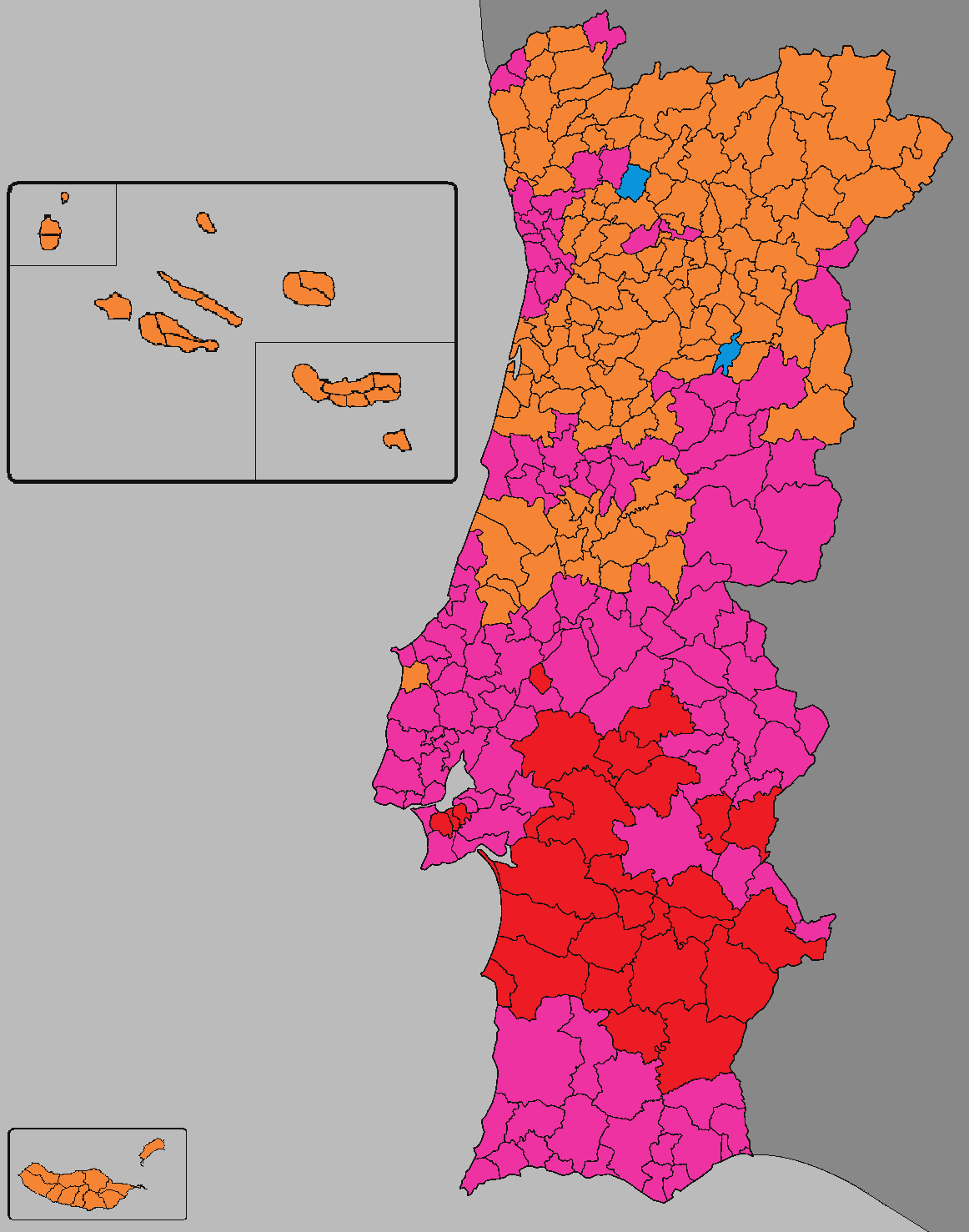 Mapa ilustrativo do partido mais votado por Concelho